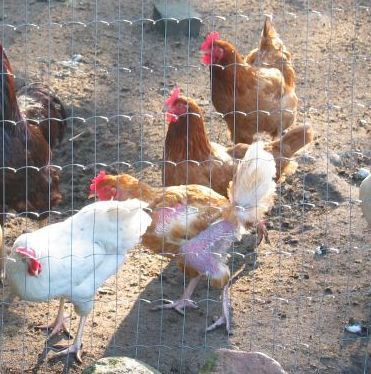 Høns i hønsegård